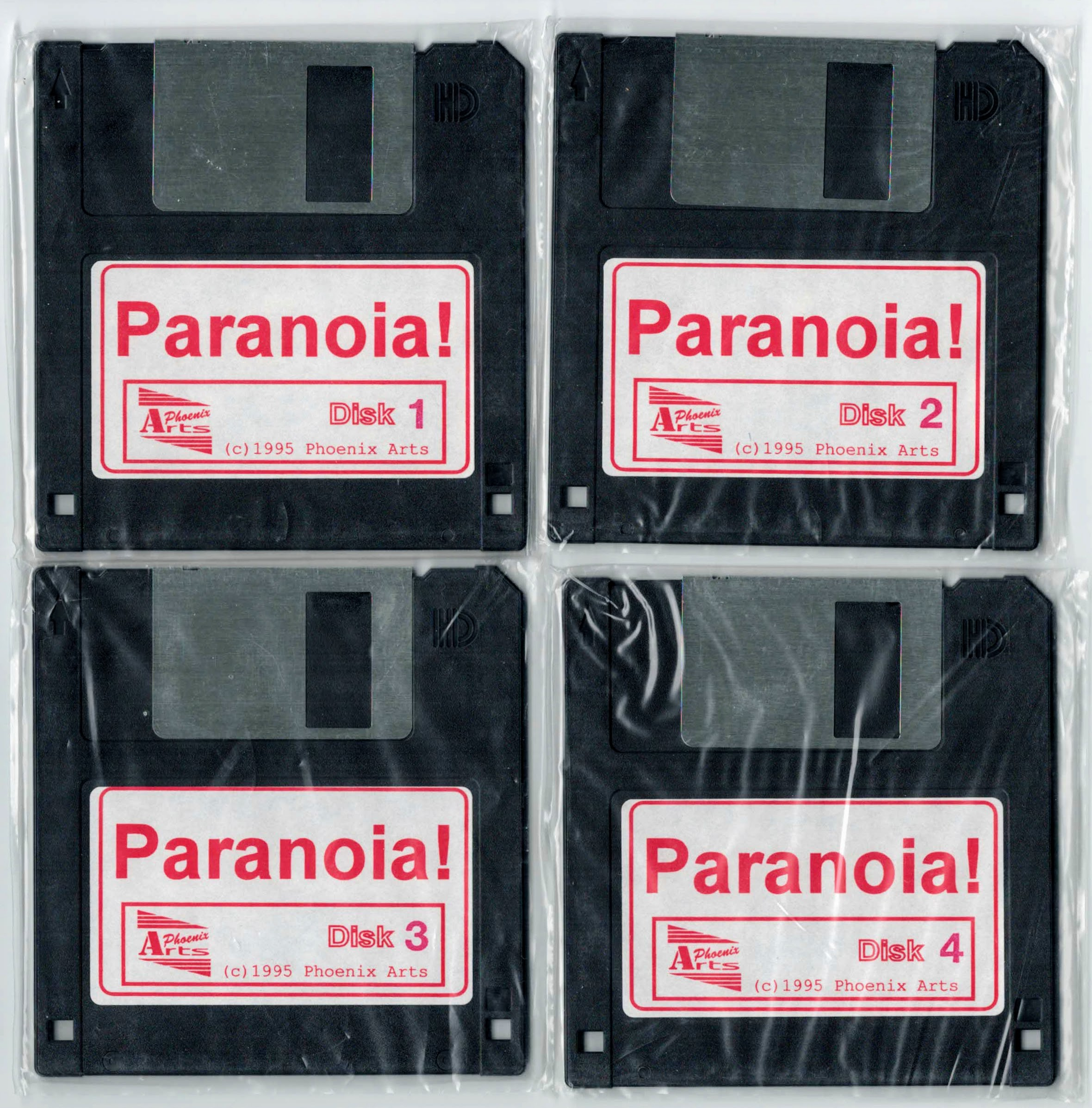 Originální instalační diskety ke hře Paranoia